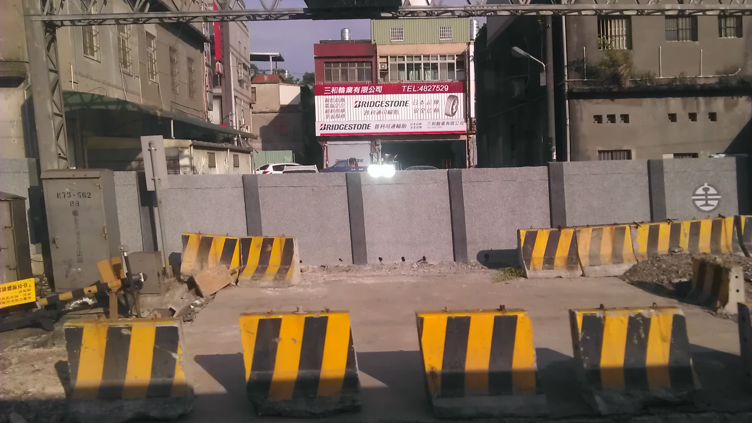 為因應埔心平交道事件再次重演，而被封閉並不再使用的平交道。